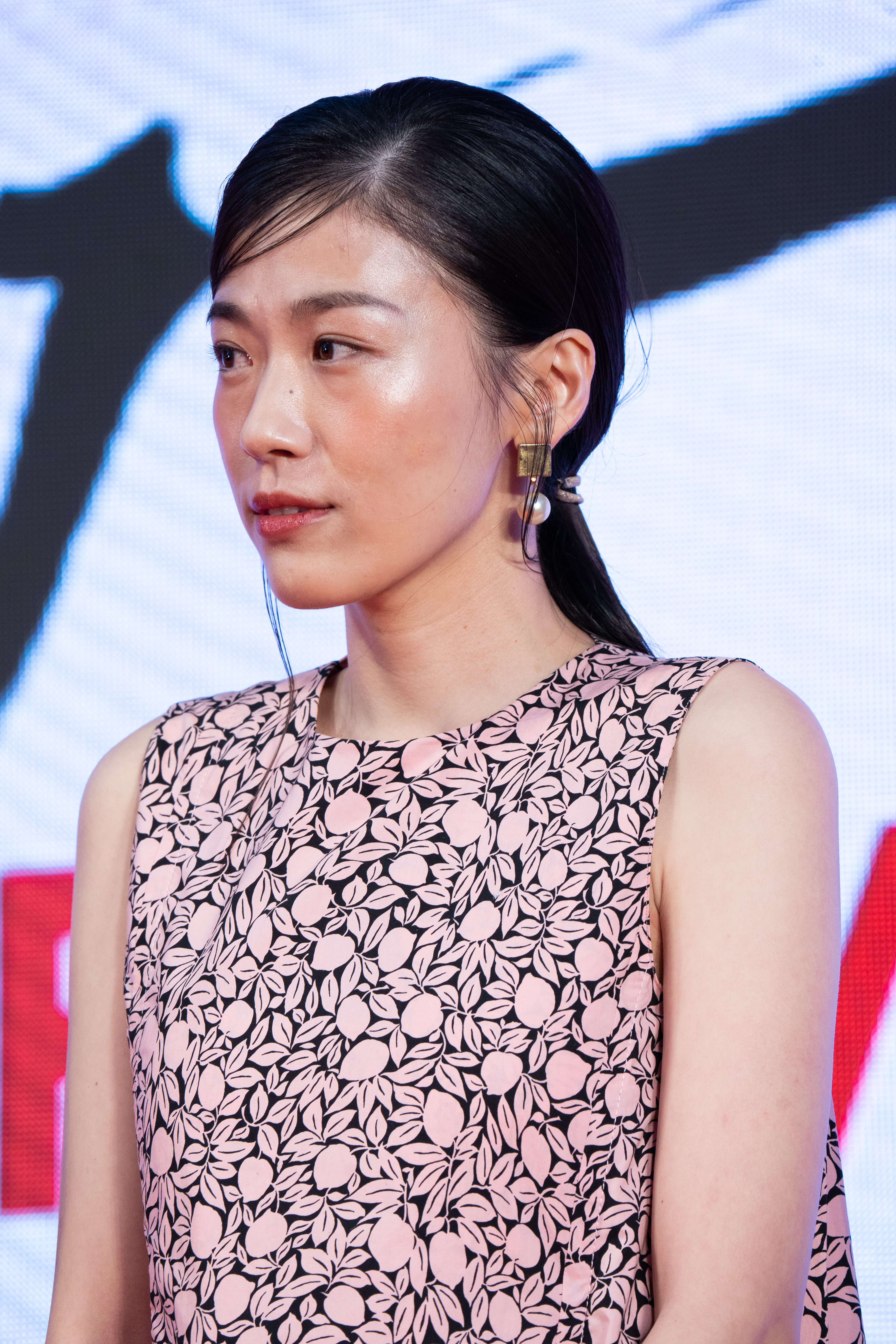 第32回 東京国際映画祭 オープニングセレモニー 呉城久美 (猿楽町で会いましょう)